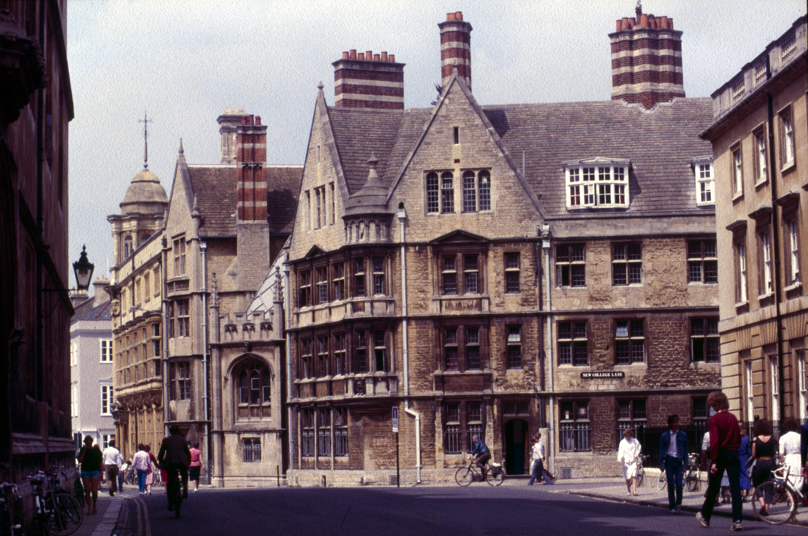 1985 in Oxford